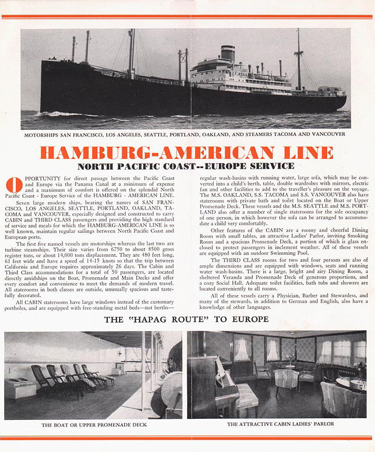 Werbung der HAPAG, Transatlantik-Schiffsroute der Hamburg-American Line